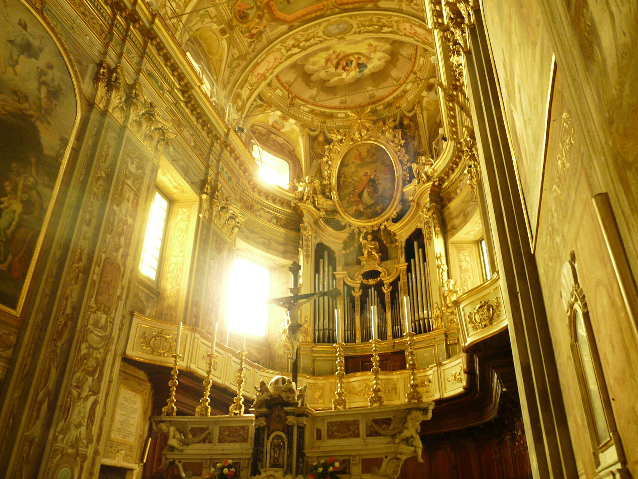 Chiesa di San Biagio, Finalborgo, Finale Ligure, Liguria, Italia